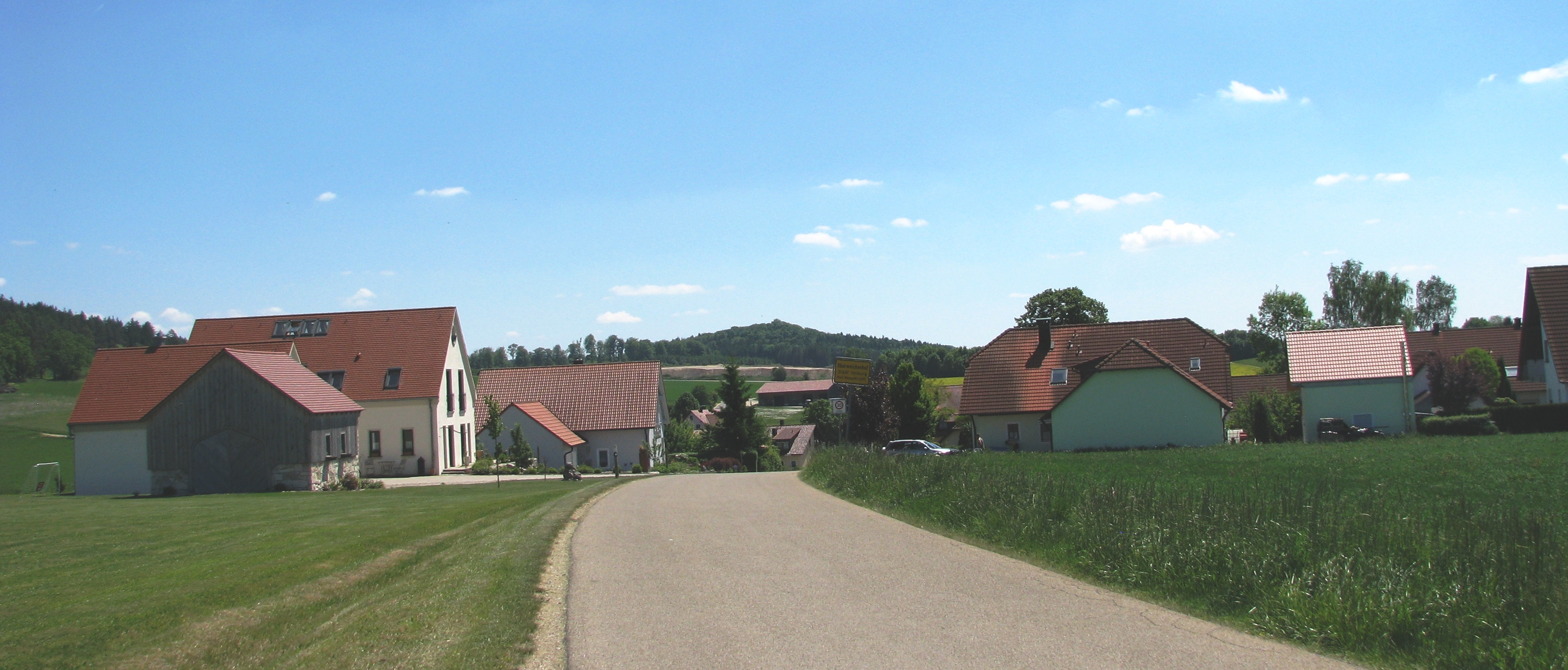 Oberweickenhof, Gemeindeteil von Velburg im Landkreis Neumarkt i. d. Opf., Bayern